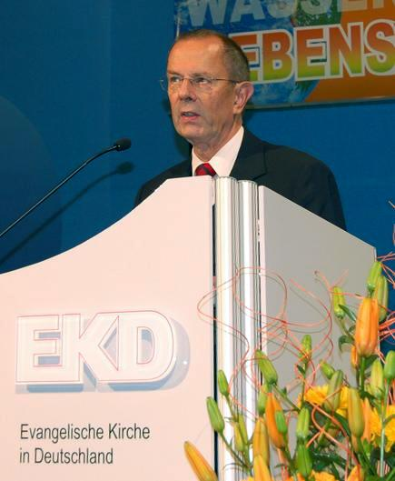 Christoph Kähler, lutherischer Theologe und unter anderem 2001–2008 Landesbischof der Evangelisch-Lutherischen Kirche in Thüringen (hier während der EKD-Synode vom November 2008 in Bremen, Deutschland).